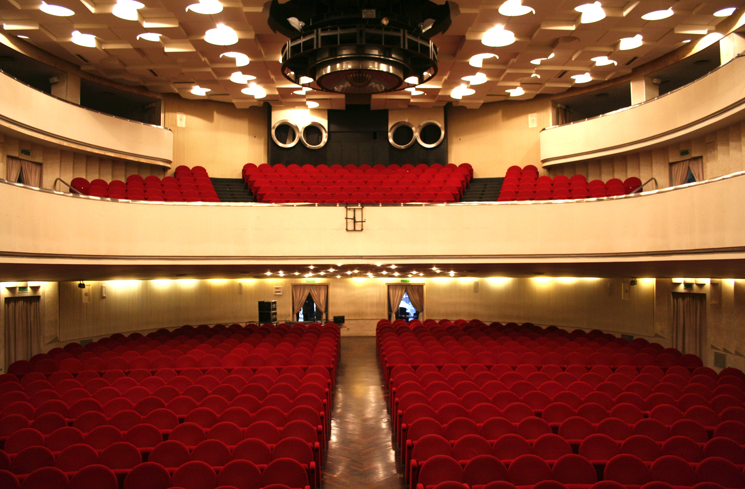 interno del teatro Novelli di Rimini